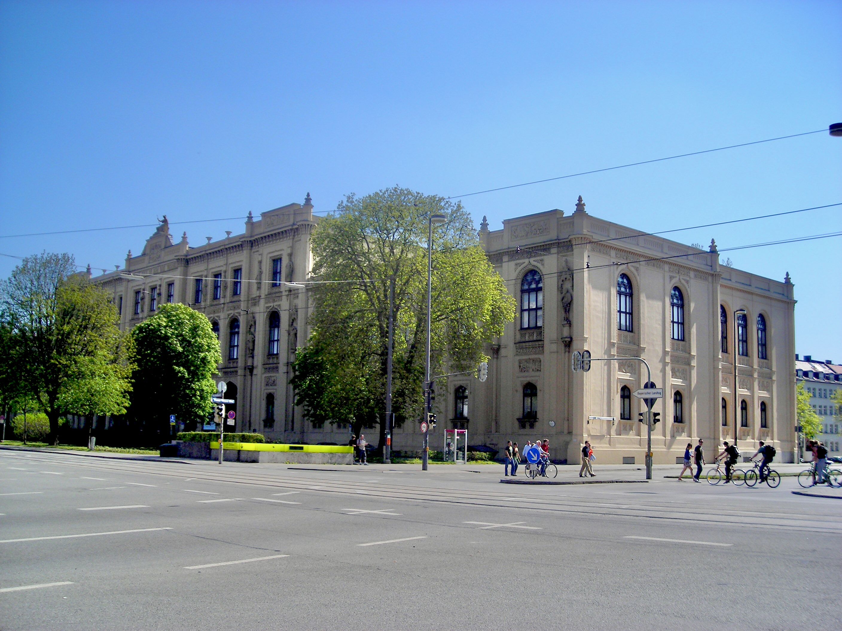 Munich